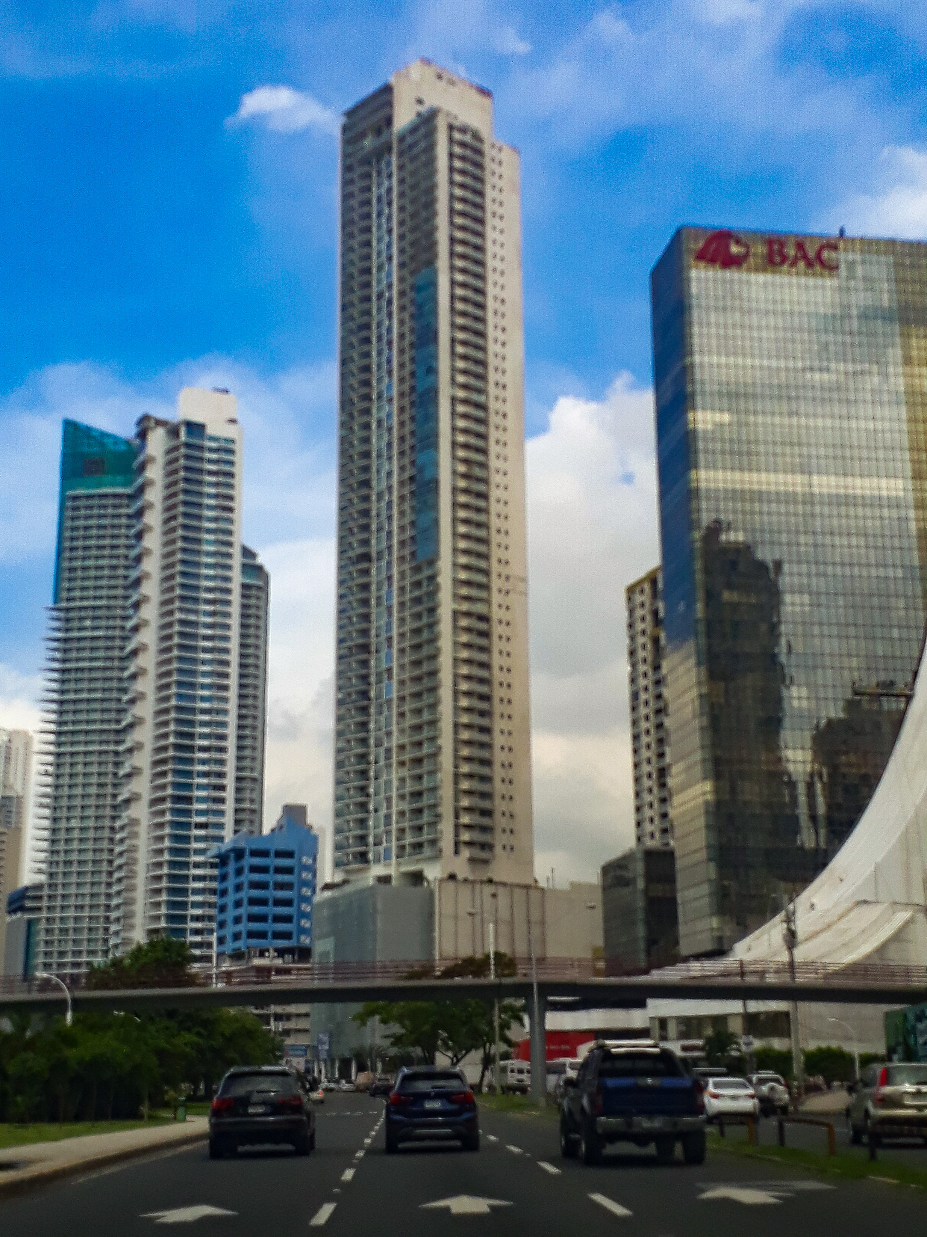 White Tower Panamá